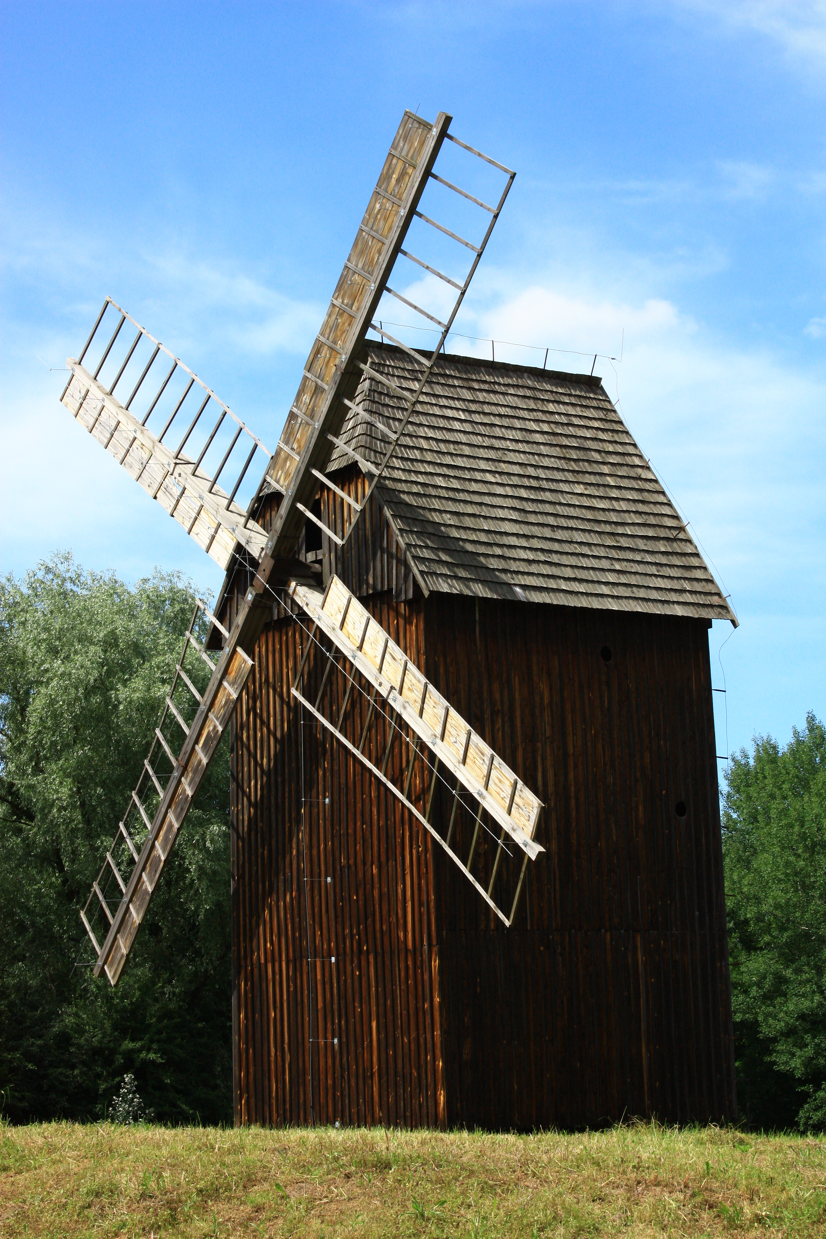 Opole, Park Etnograficzny